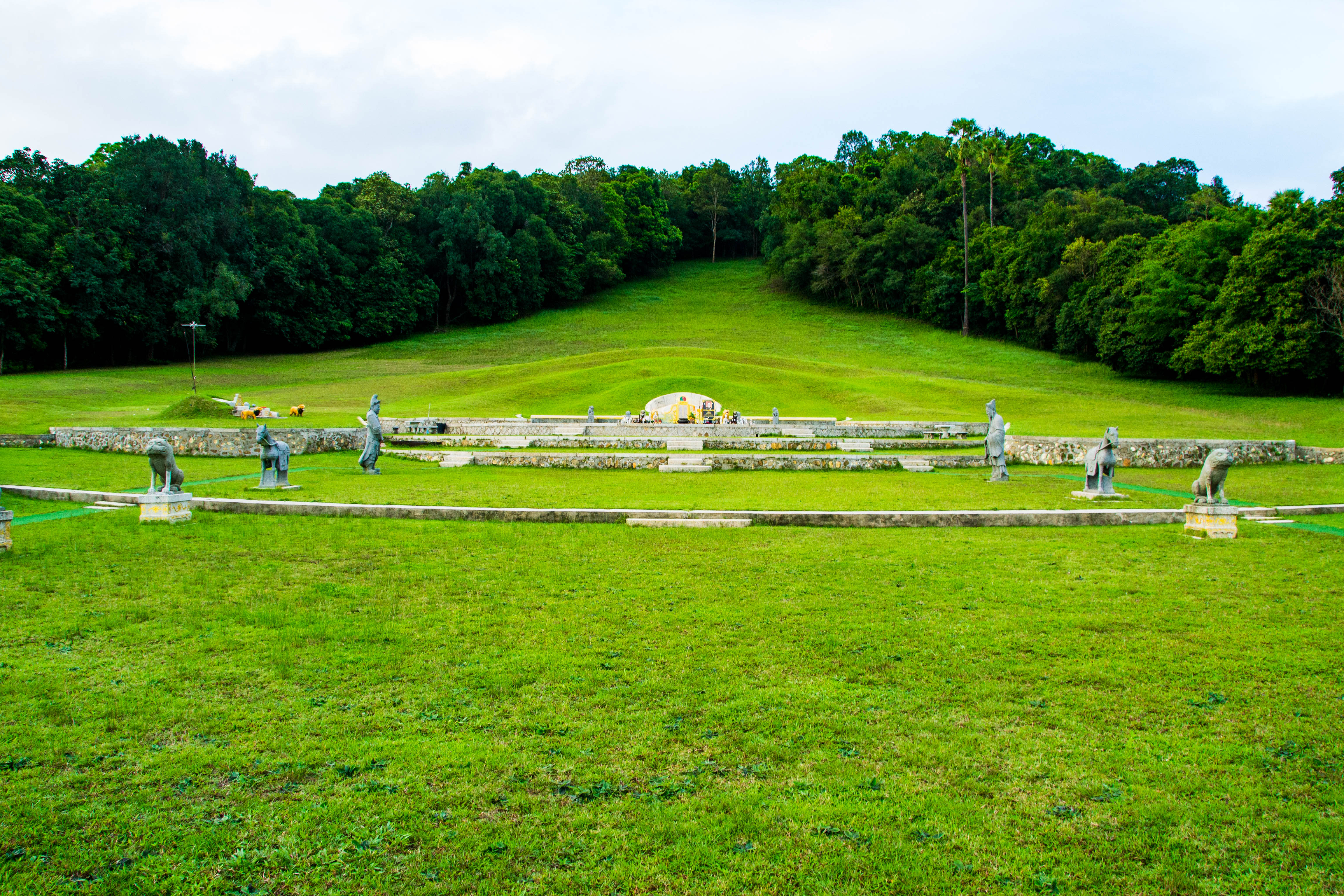 สุสานพระยาดำรงสุจริตมหิศรภักดี